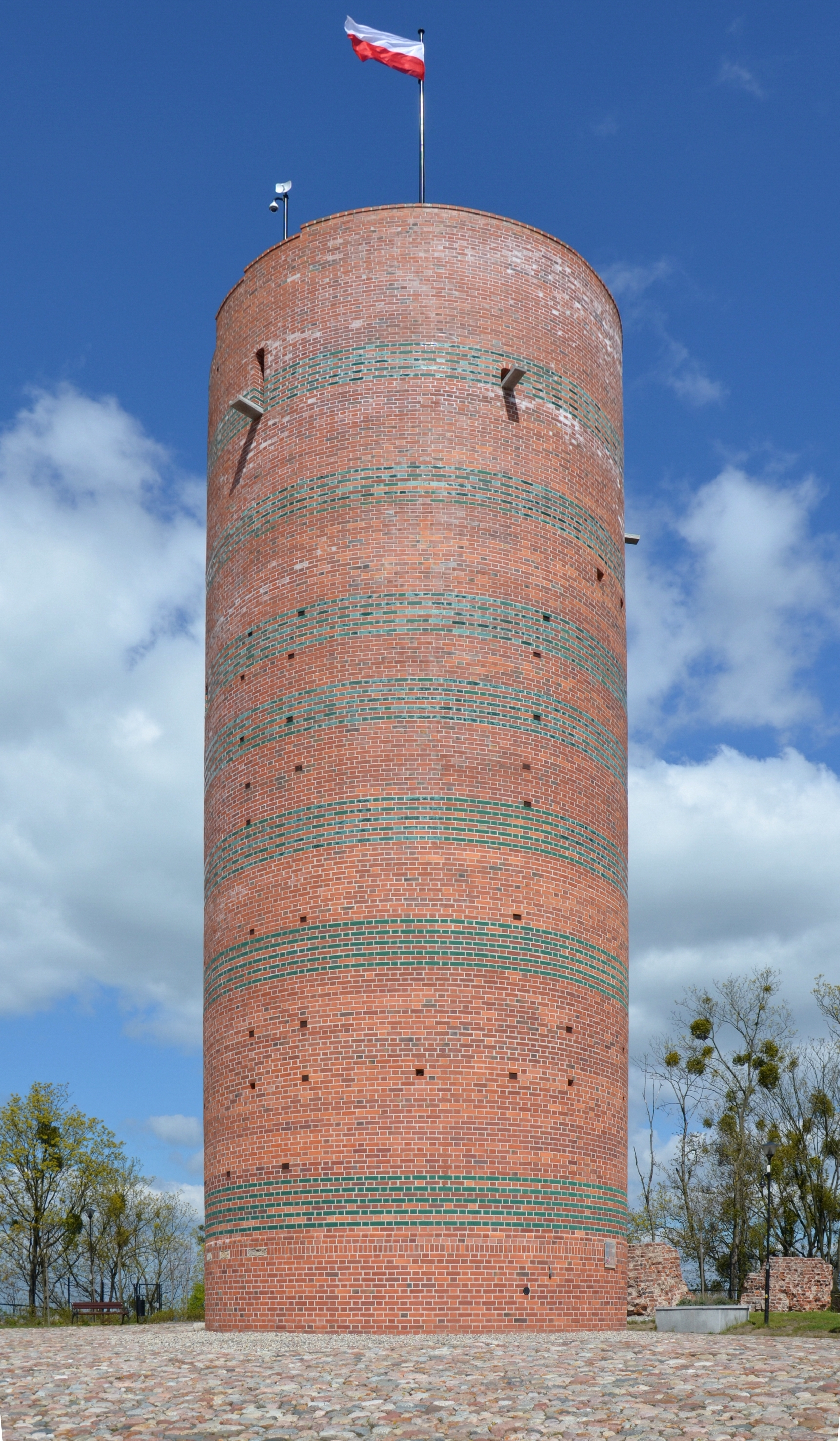 Grudziądz, Wieża Klimek